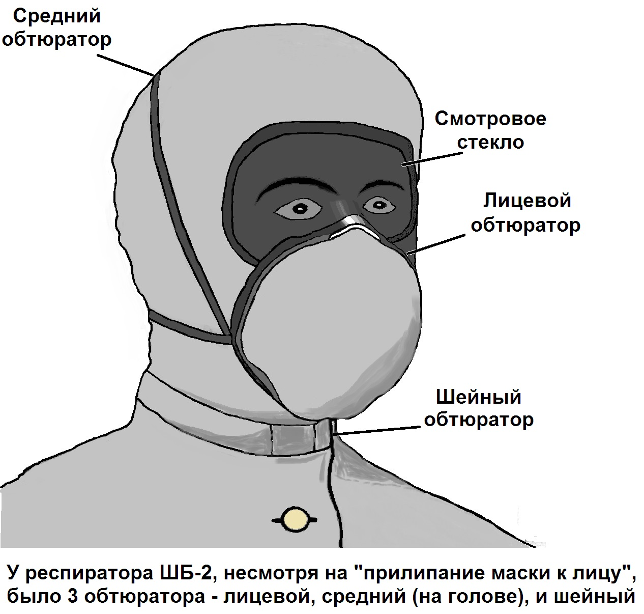 Схема респиратора ШБ-2 Лепесток с тремя обтюраторами. Это попытка дальнейшего развития конструкции респиратора, направленная на уменьшения проникания неотфильтрованного воздуха через зазоры между маской и лицом - три обтюратора и два компенсационных фильтра между ними.